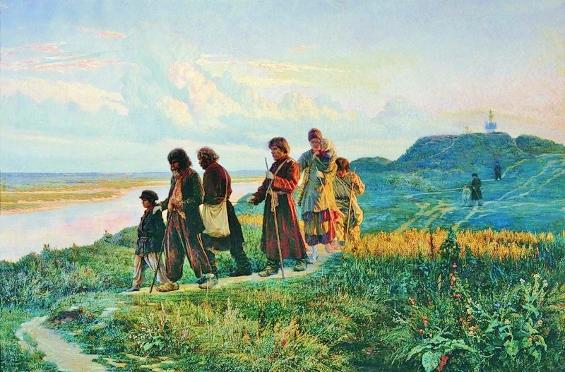 Слепцы